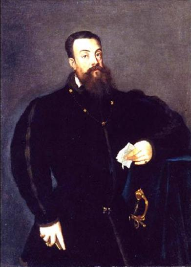 Federico II Gonzaga